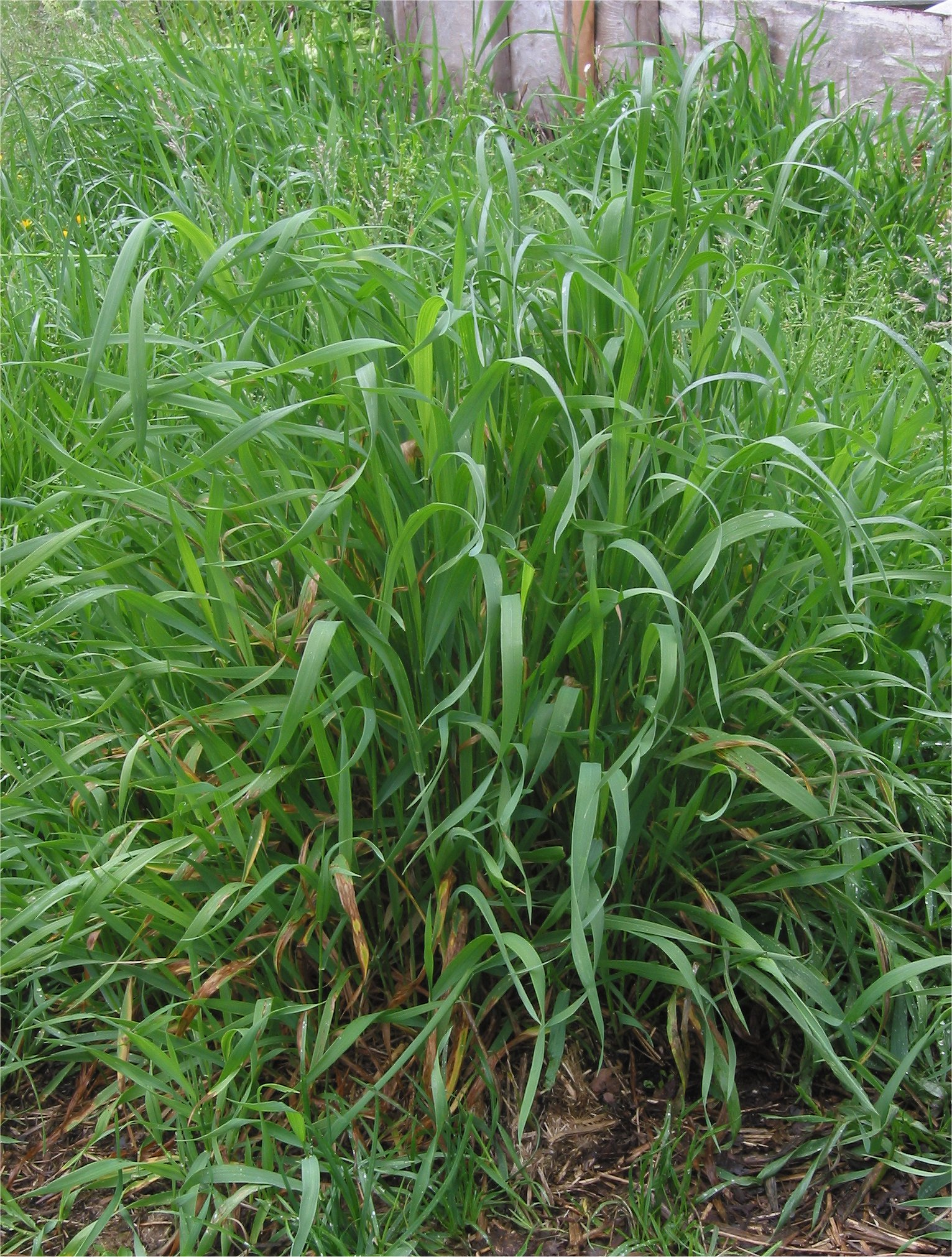 Kweek Elytrigia repens